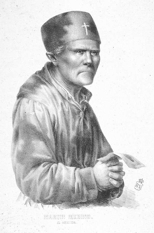 Retrato de Martín Merino, autor de un atentado fallido contra Isabel II.